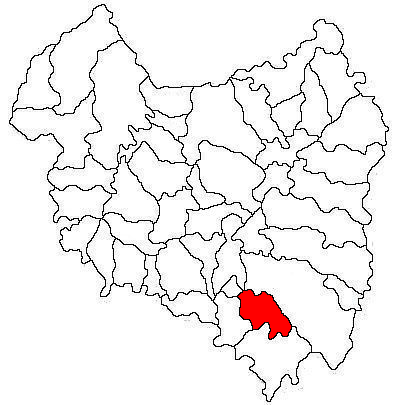 Categorie:Hărţi ale judeţului Covasna